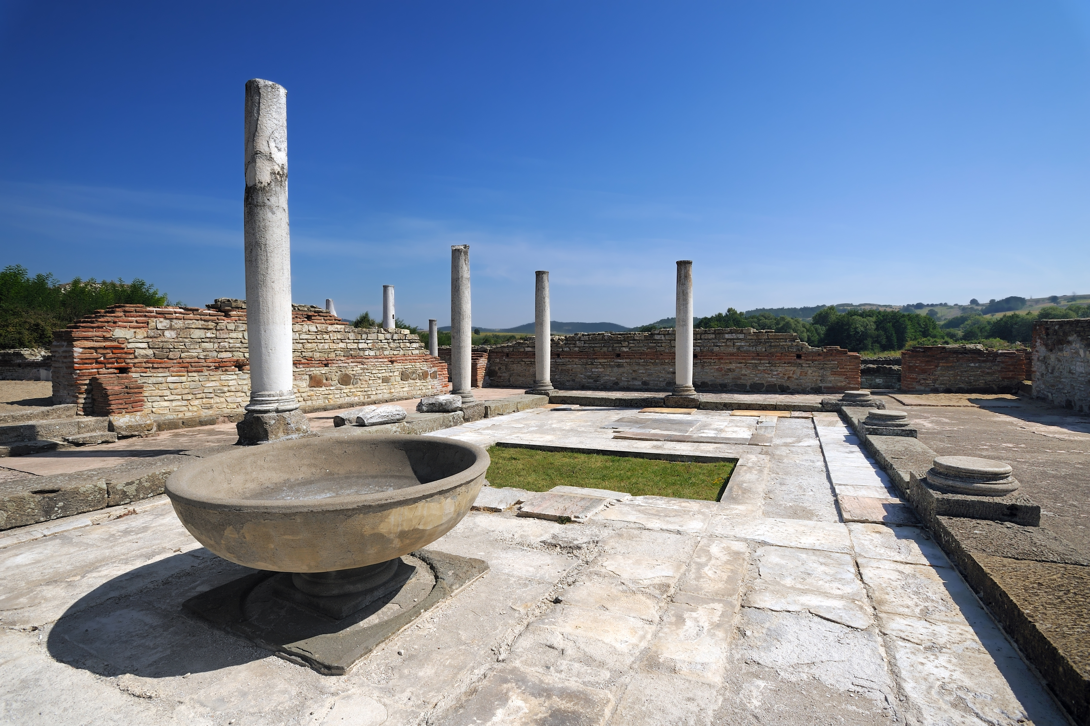 carska palata Felix Romuliana